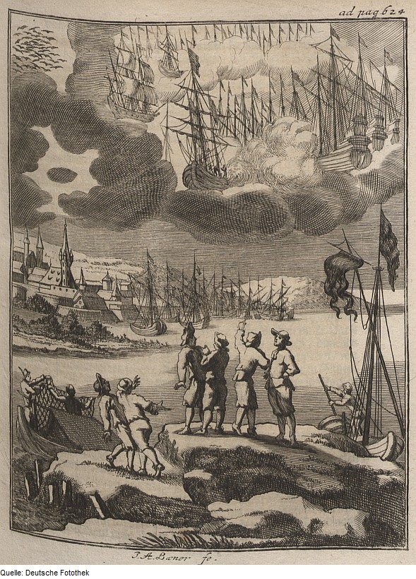 Original image description from the Deutsche Fotothek Mythologie & Märchen